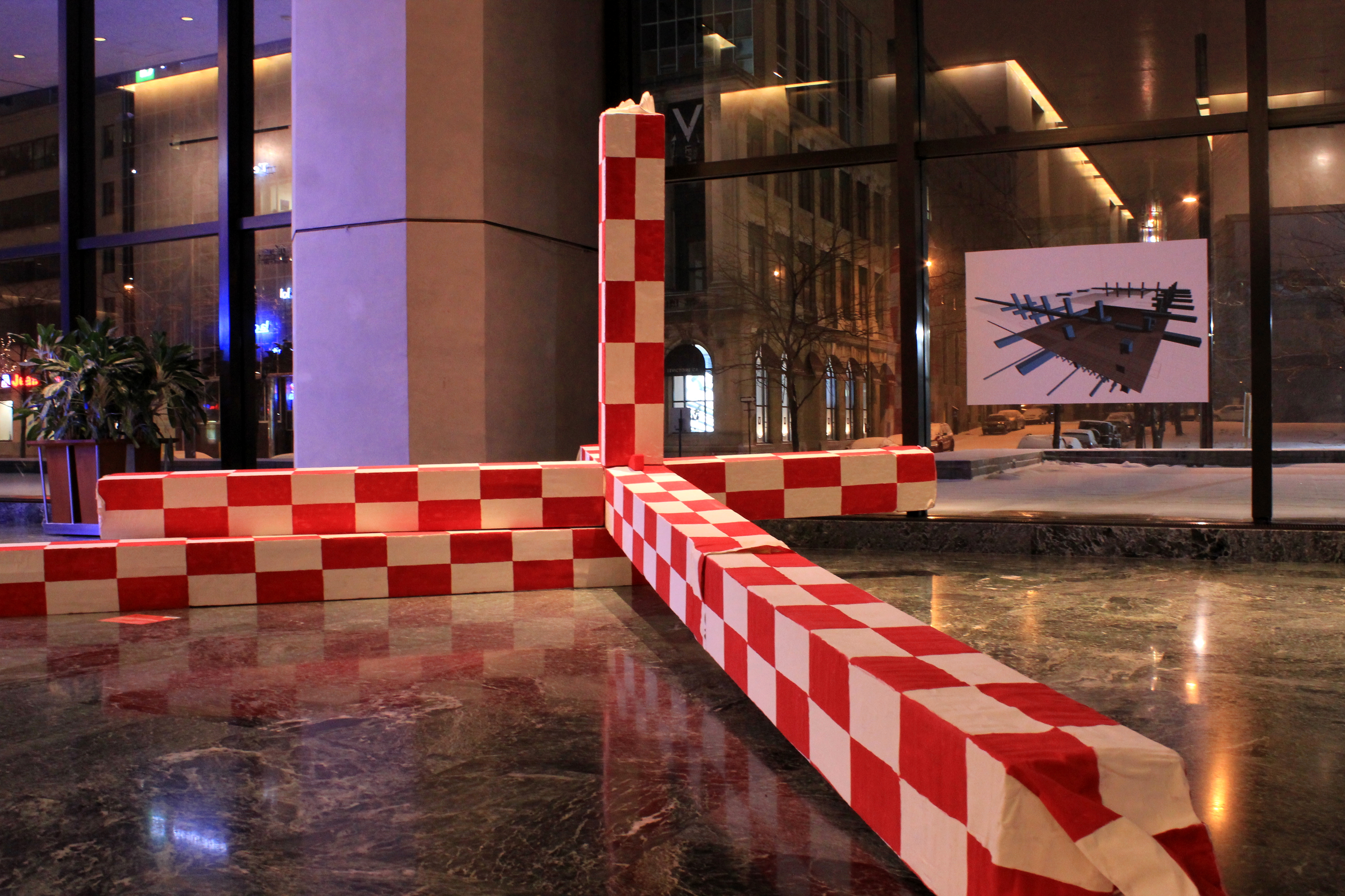 ZONE TOUR DE LA BOURSE INSTALLATION Une enquête sur... BIOGRAPHIE DE L'ARTISTE Après avoir déménagé à Montréal en 1994, David Butler suit une pratique multidisciplinaire provenant d'études en linguistique, en histoire de l'art, en photographie et, plus récemment, en sculpture. Il termine actuellement une maîtrise en beaux-arts à l'Université Concordia. DÉMARCHE DU PROJET Utilisant comme thème les ruines, David Butler crée des objets, des images et des installations qui semblent coincés dans le temps, oscillants entre le passé, le présent et l'avenir. Ses oeuvres forcent le spectateur à examiner leur propre place dans un monde de plus en plus défini par des images, un monde qui, comme la ruine, est à la fois présent et absent, qui existe à la fois dans le matériel et dans l'imaginaire.